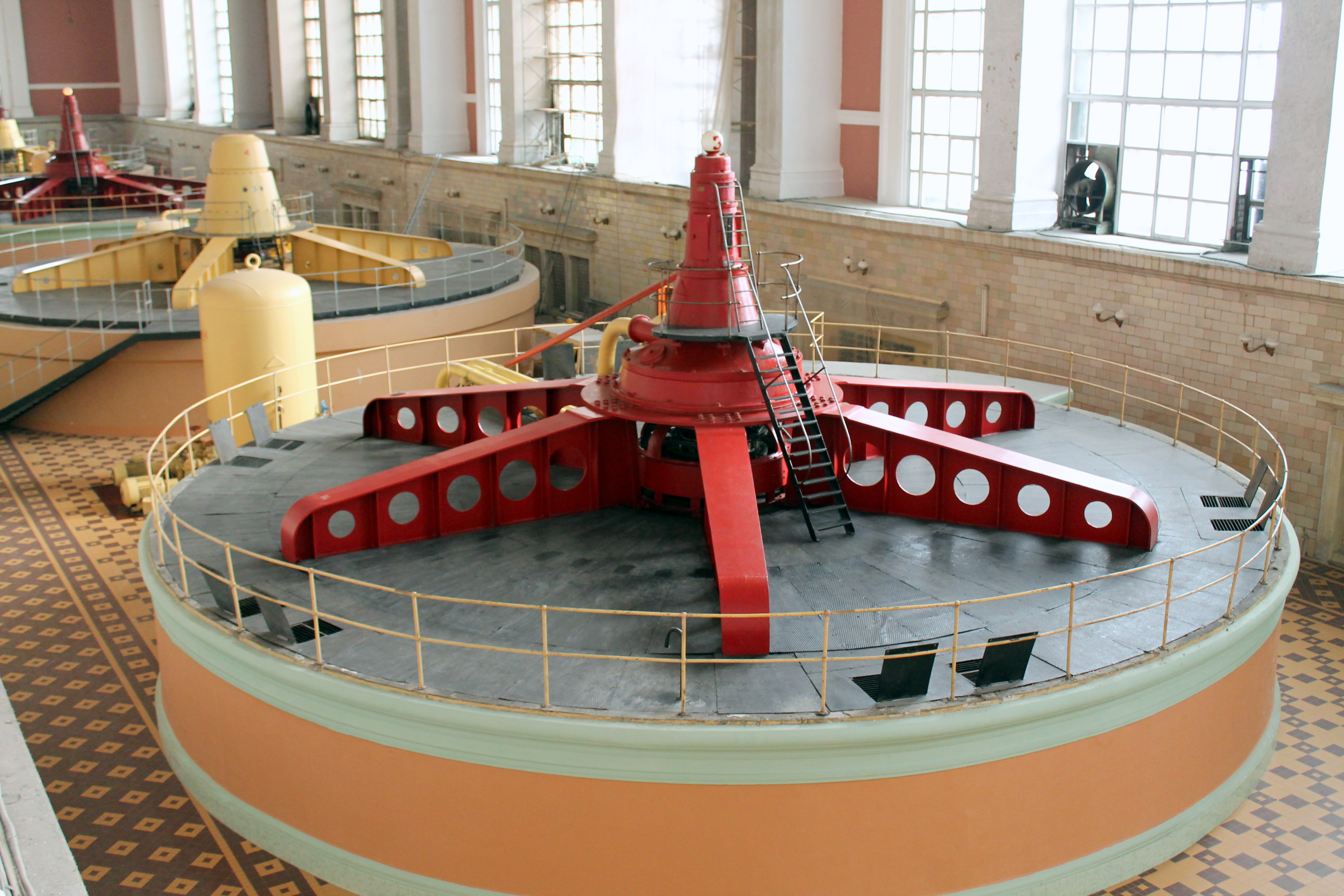 Старый (55 МВт) гидроагрегат Рыбинской ГЭС